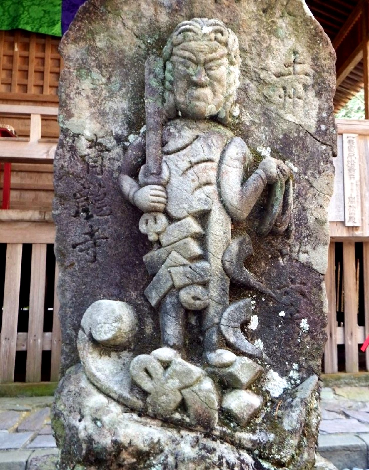 青龍寺の本堂前の石像